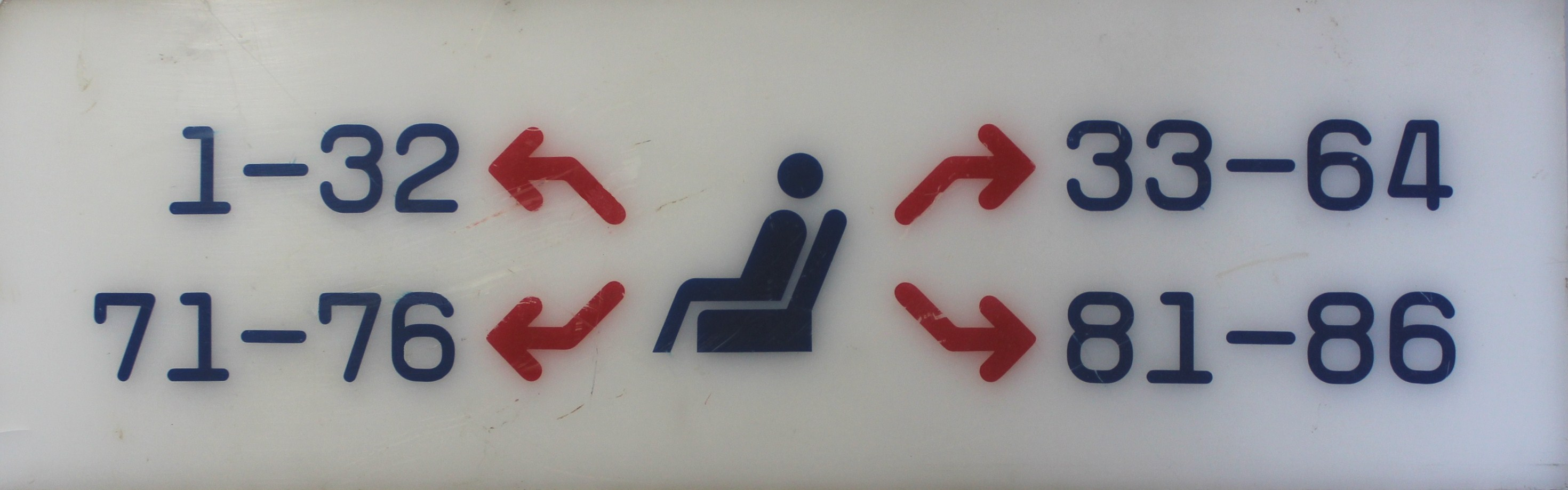 近鉄30000系Ｔ車座席案内表示